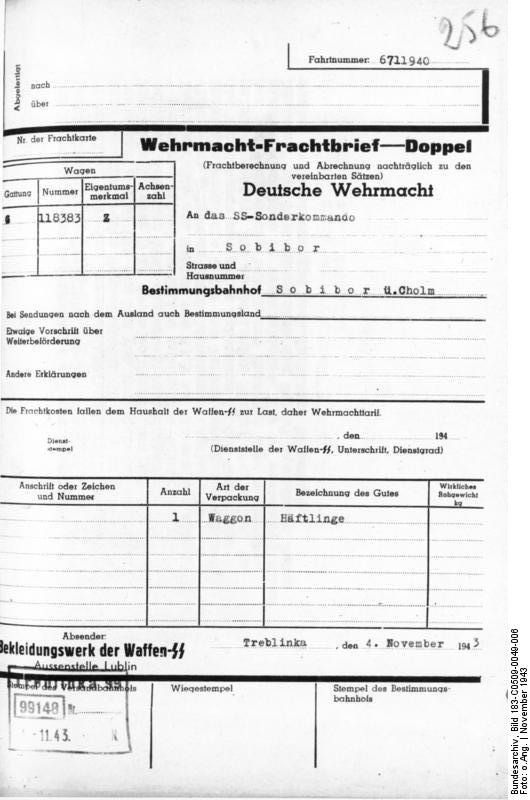 Zentralbild/H.Land, 9.5.1964 Zur Einweihung der Gedenkstätte auf dem ehemaligen Vernichtungslager Treblinka am 10. Mai Nicht allzu weit von Warschau entfernt , aber in einer fast menschenleeren Gegend mitten in Wäldern gelegen, wurde Mitte 1942 mit dem Bau von Treblinka II begonnen. Teblinka I, etwa 3 km davon entfernt, war von der SS schon im November 1941 als Arbeitsstraflager für "renitente Polen" errichtet worden. Das Vernichtungslager umfaßte ein Gebiet von 13,5 ha. Es war mit einem elektrisch geladenen Stacheldrahtzaun umgeben. In Treblinka wurden die Opfer mit Verbrennungsgasen getötet, die von Motoren aus einem Nebenraum in die Gaskammern geleitet wurden. Die nazistischen Mörder taten alles, um den zur Vernichtung bestimmten Menschen ihre verbrecherischen Absichten zu verheimlichen. Die in westeuropäischen Ländern "zur Umsiedlung nach dem Osten" bestimmten Juden wurden in Personenzügen nach Teblinka befördert. UBz.: Faksimile eines Wehrmachtsfrachtbriefes über den Transport von Häftlingen.